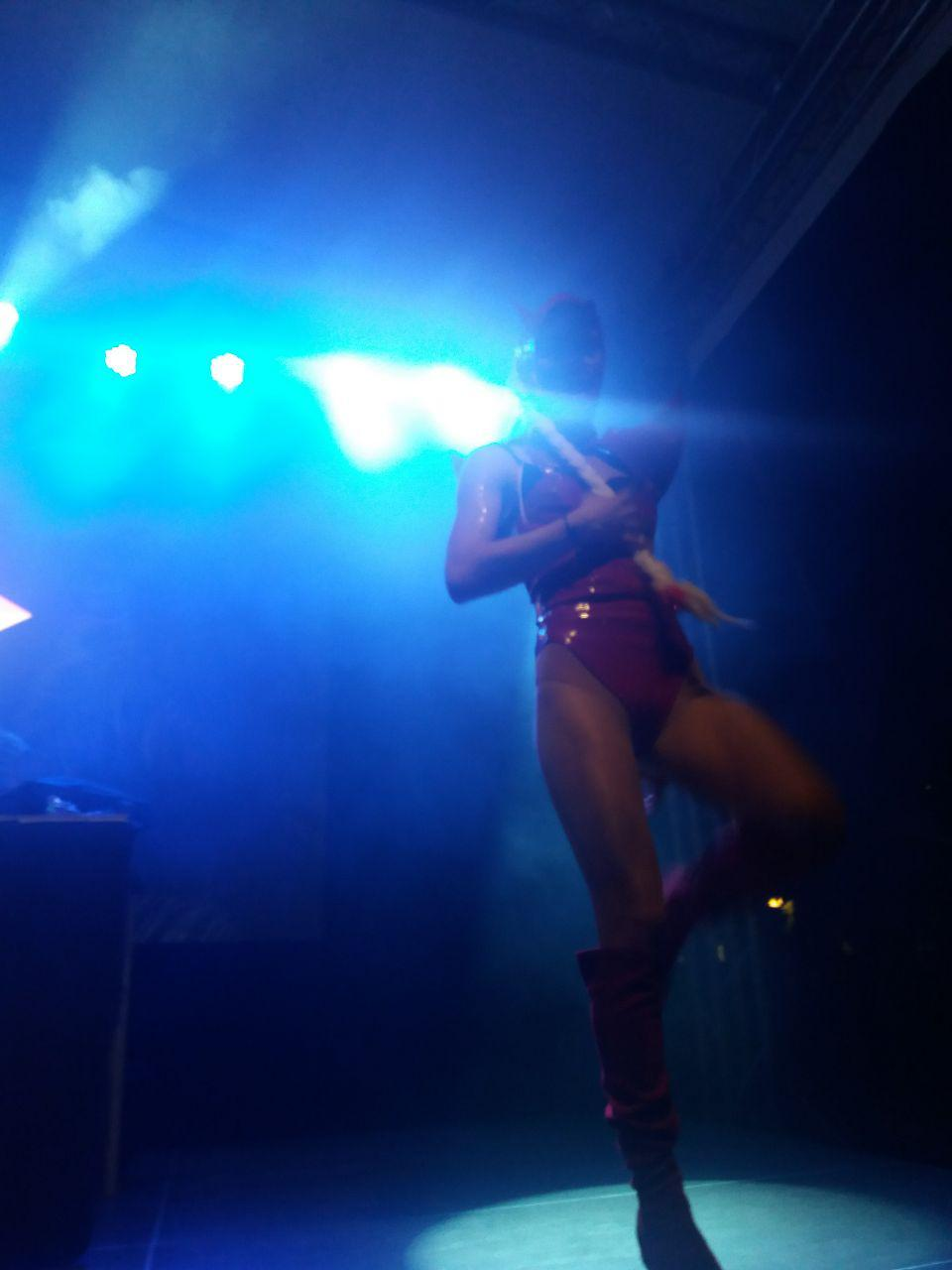 NJë performuese drag queen nga Kosova gjatë Paradës së Krenarisë në Beograd, 2019.